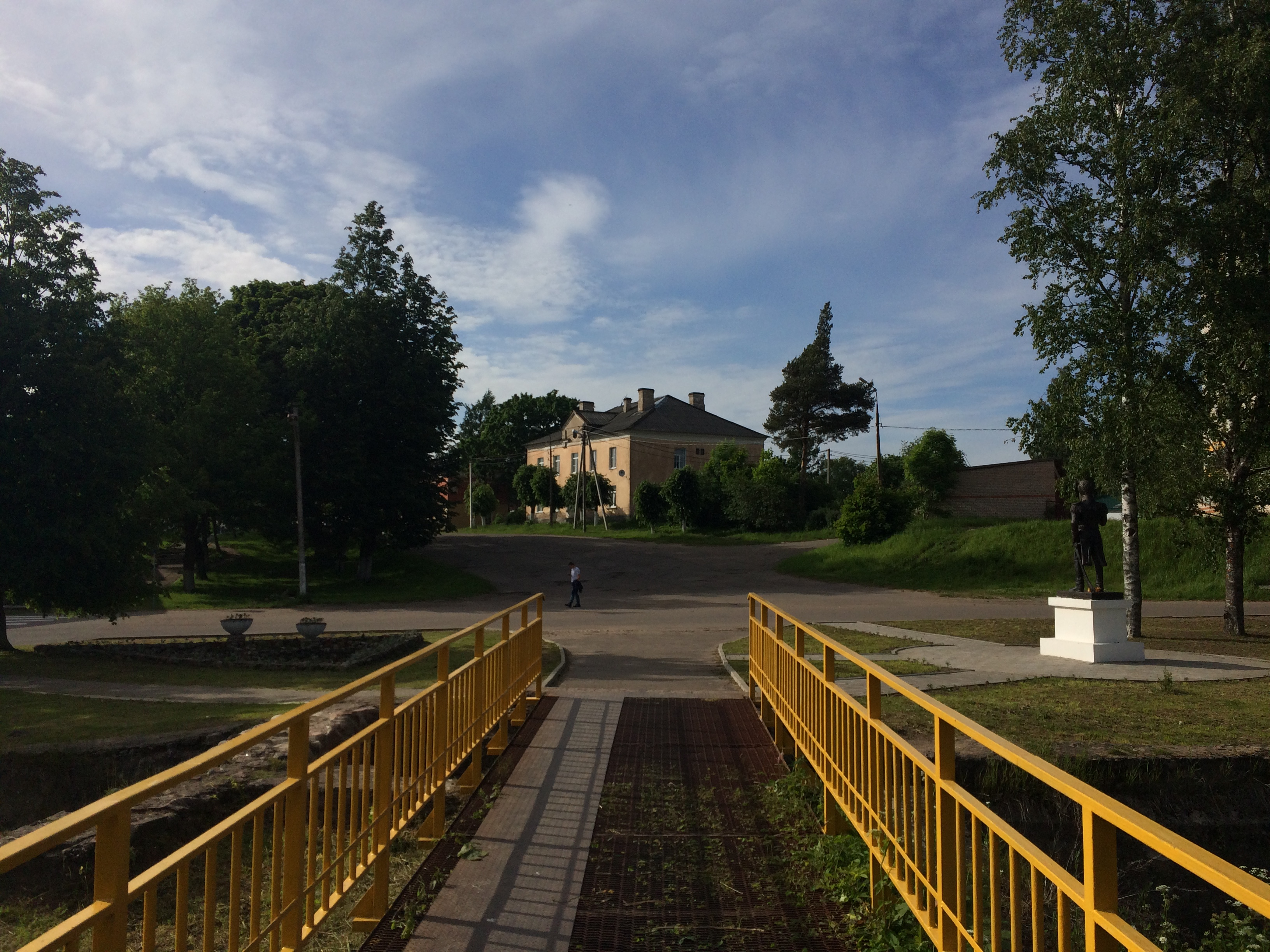 Площадь у реки Гдовки, город Гдов.